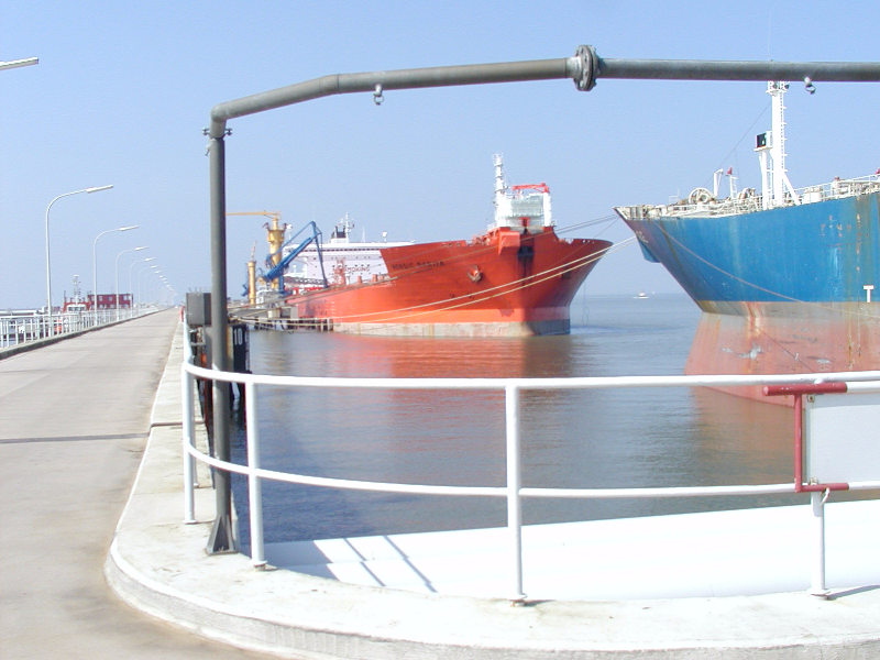 Löschbrücke der NWO-Pipeline in Wilhelmshaven